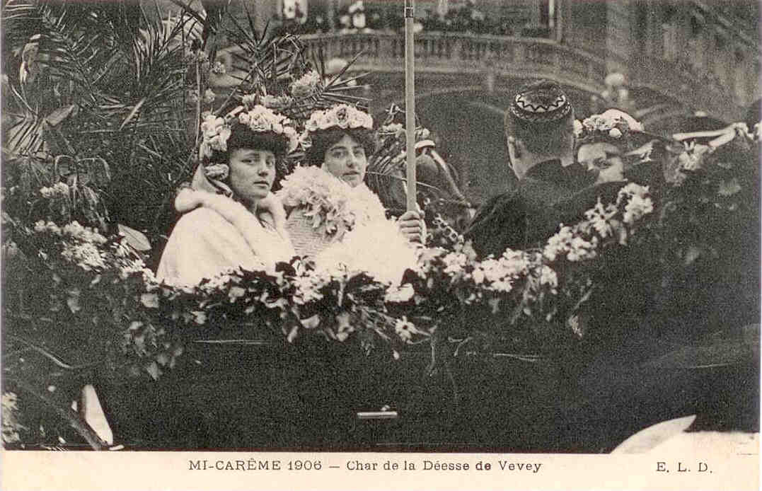 Cortège de la Mi-Carême au Carnaval de Paris 1906 : une voiture portant des délégués suisses dont Mademoiselle Hermance Taverney, Palès déesse du Printemps de la Fête des Vignerons de Vevey 1905 et se deux demoiselles d'honneur.